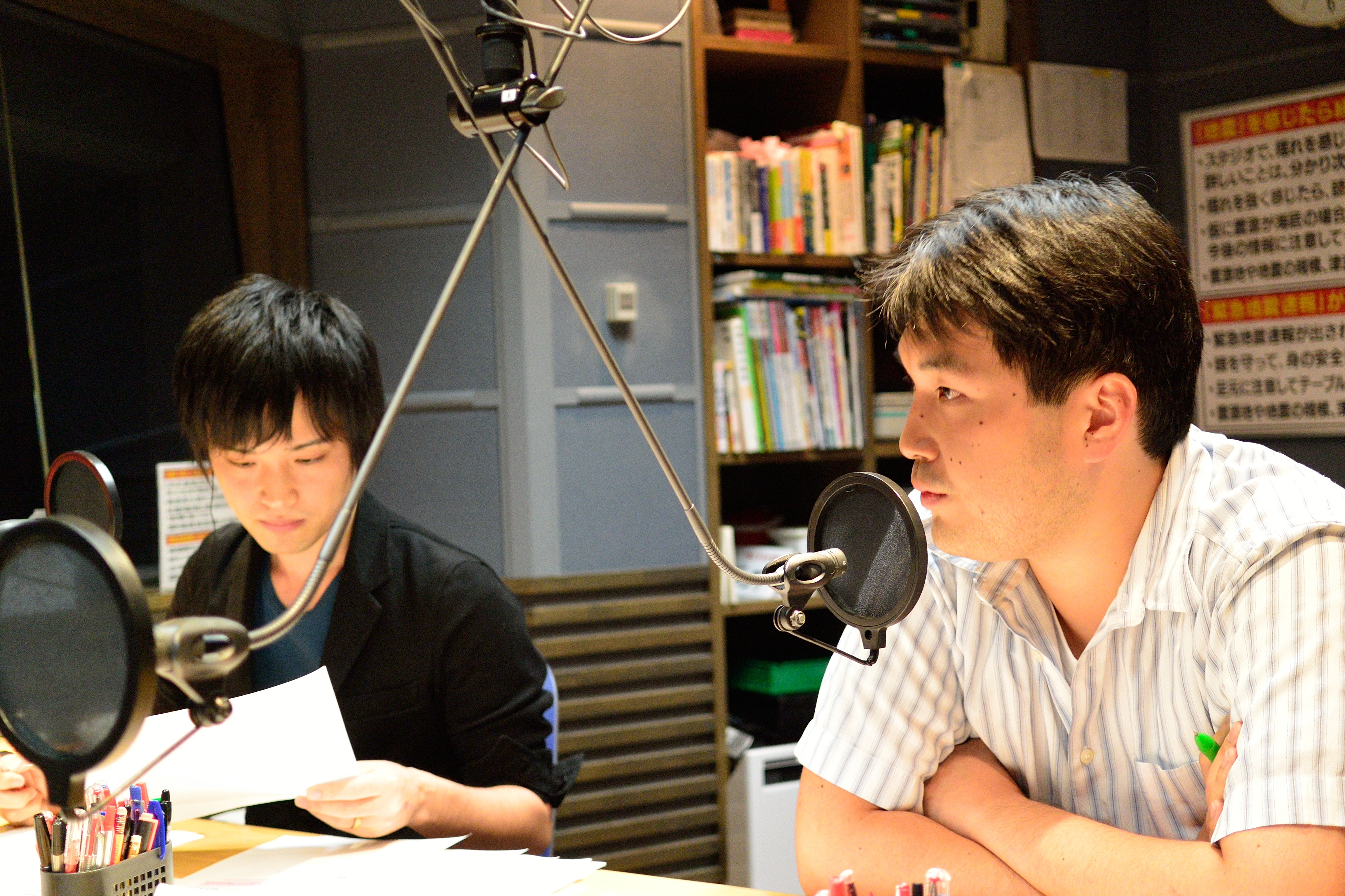 荻上チキ・Session-22 2013年08月29日（木）原発事故から約2年半。今、改めて考える「内部被ばく」（探究モード） [1]